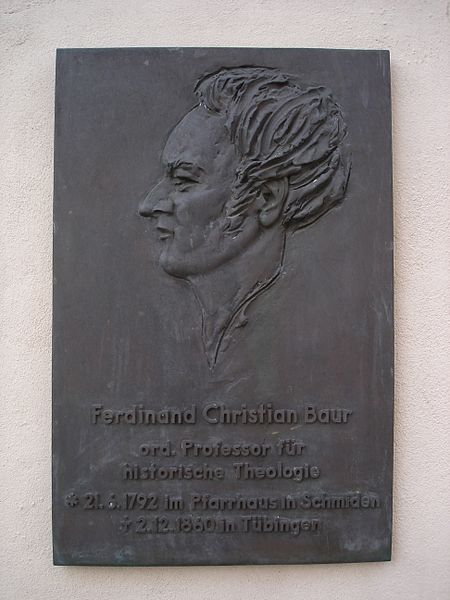 Gedenktafel für Ferdinand Christian Baur am Geburtshaus in Fellbach-Schmiden